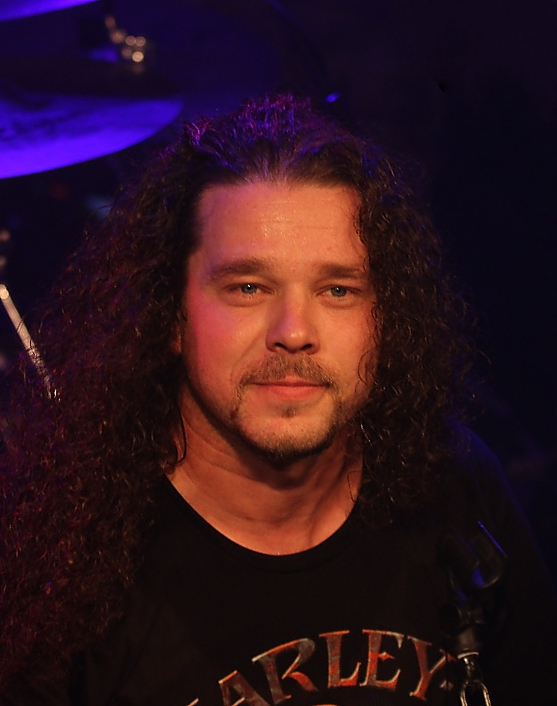 Jan Toužimský, český zpěvák, hudebník, muzikálový herec a frontman české metalové kapely Arakain.